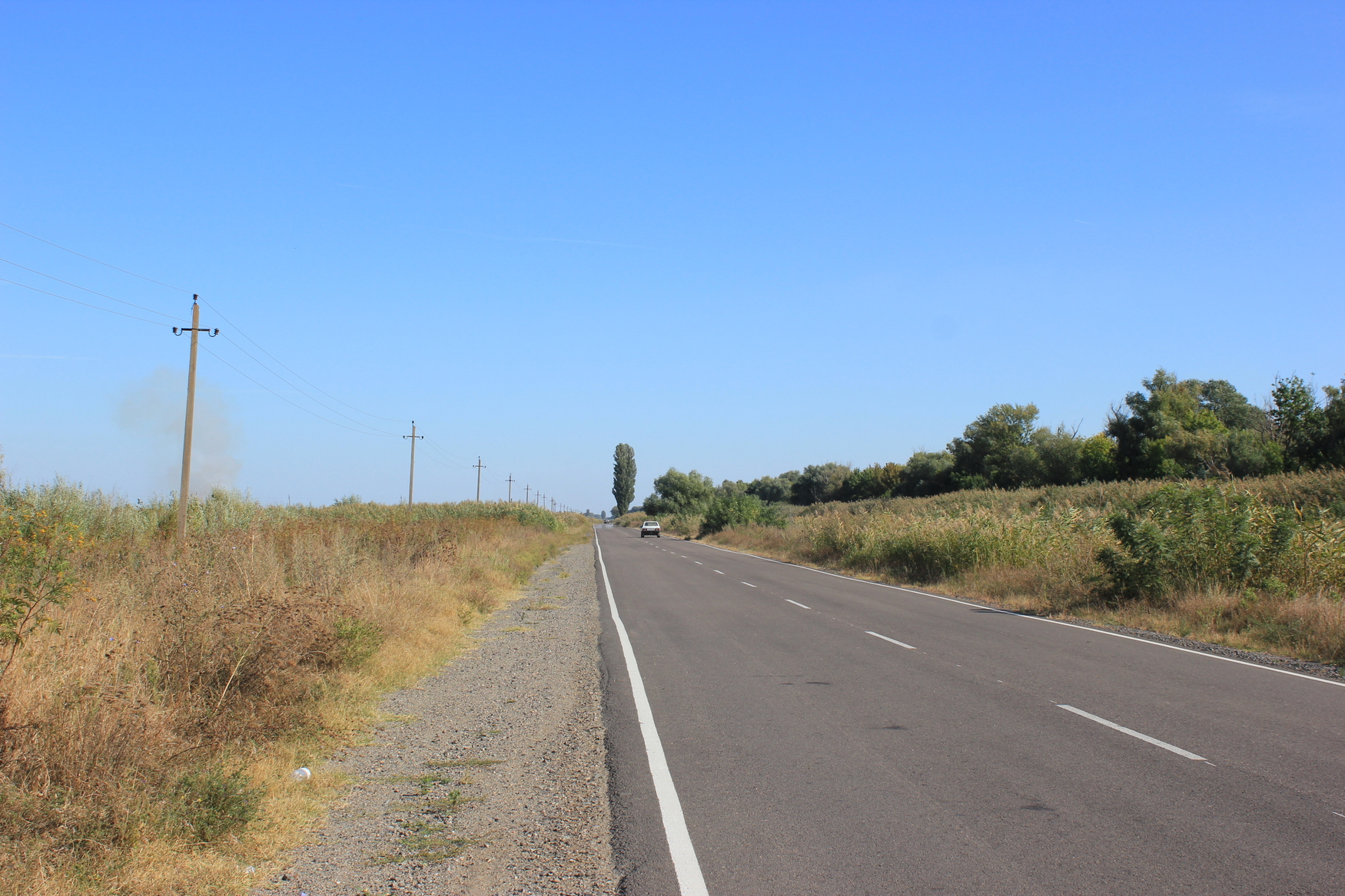 Landstraße M-15 von Ismajil nach Reni, Ukraine.